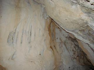 Es Culleram, Ibiza